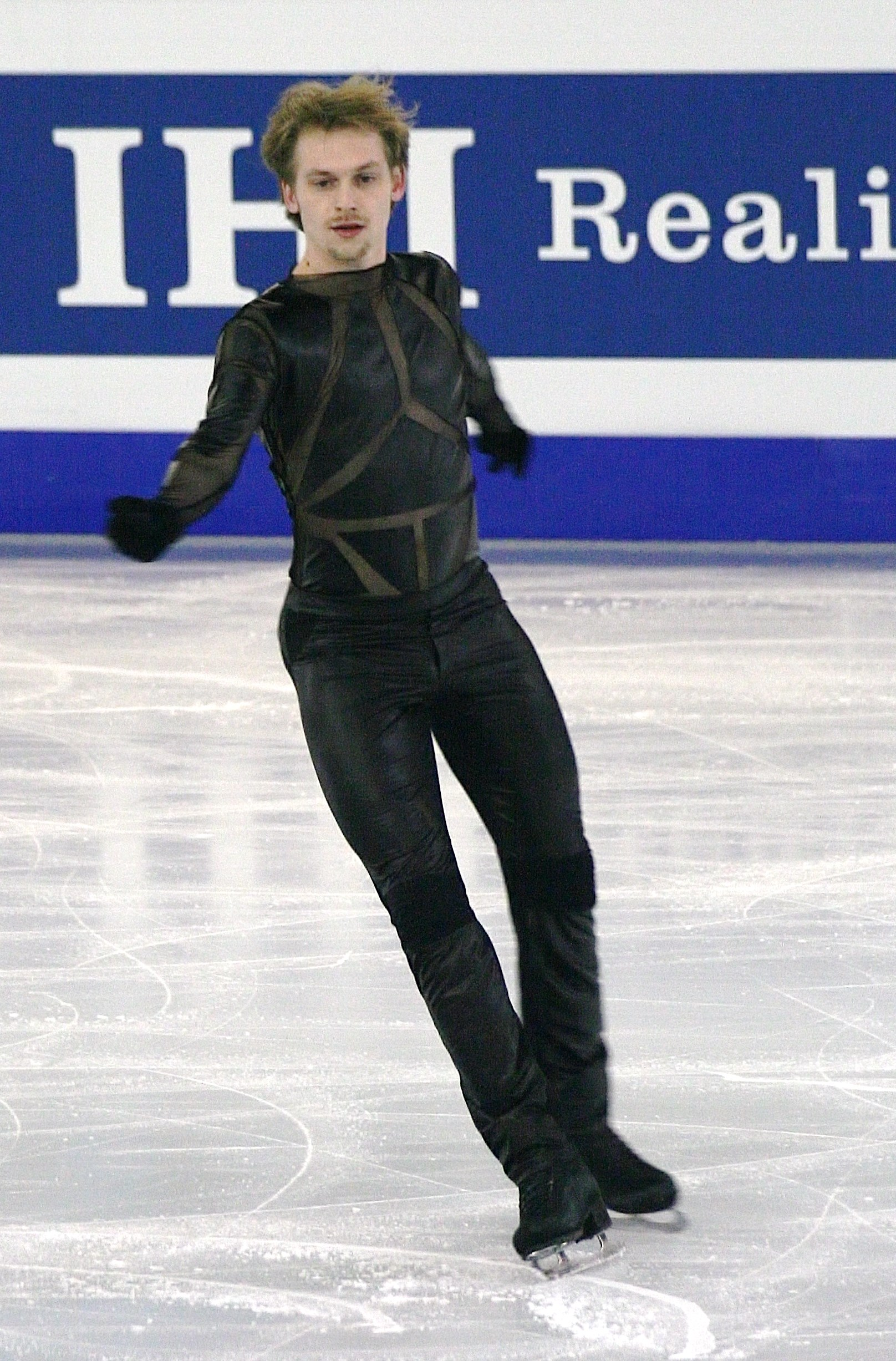 Сергей Воронов (Россия) на финале Гран-при по фигурному катанию 2014-2015.